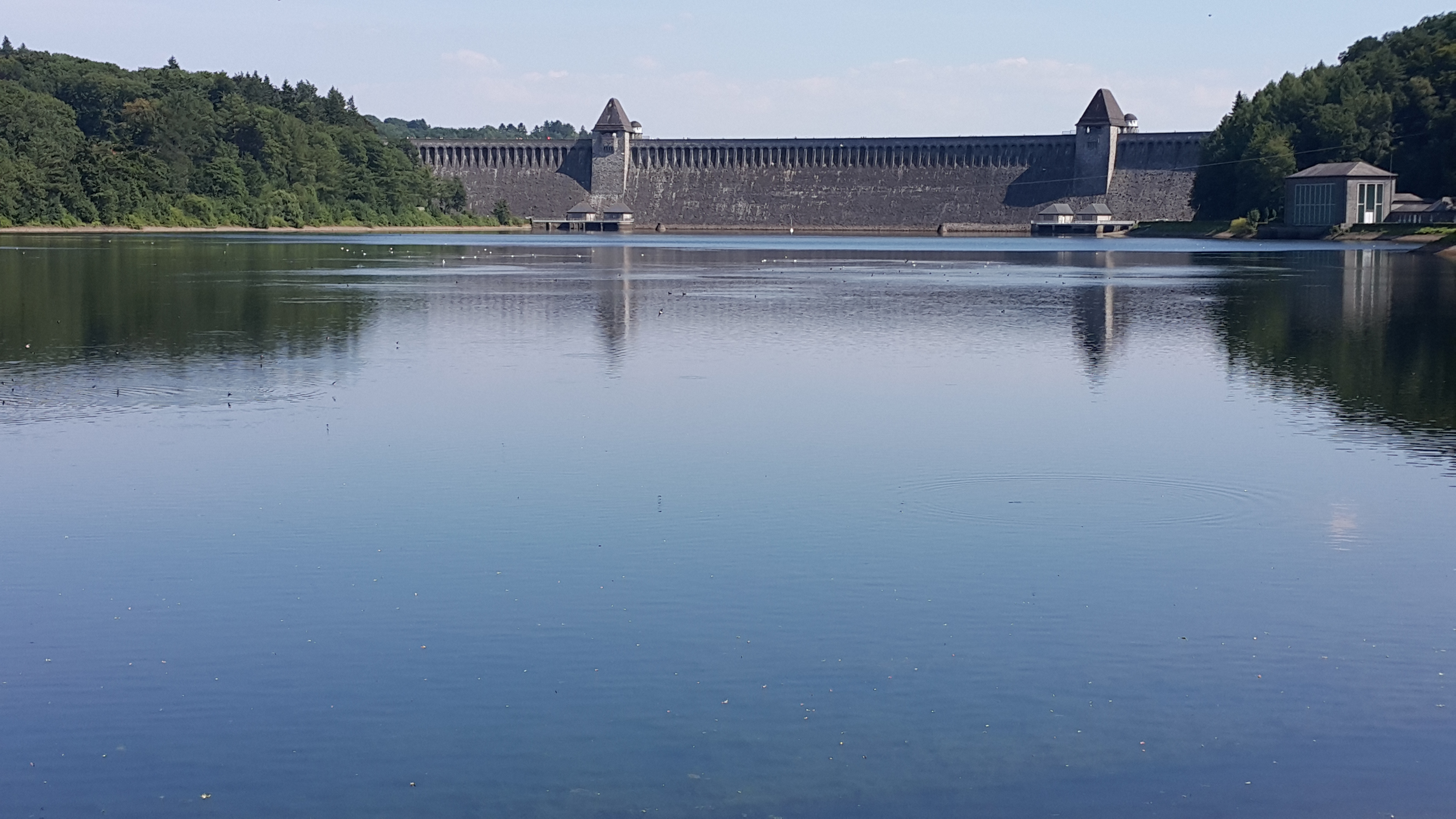 Mionės tvenkinio užtvanka